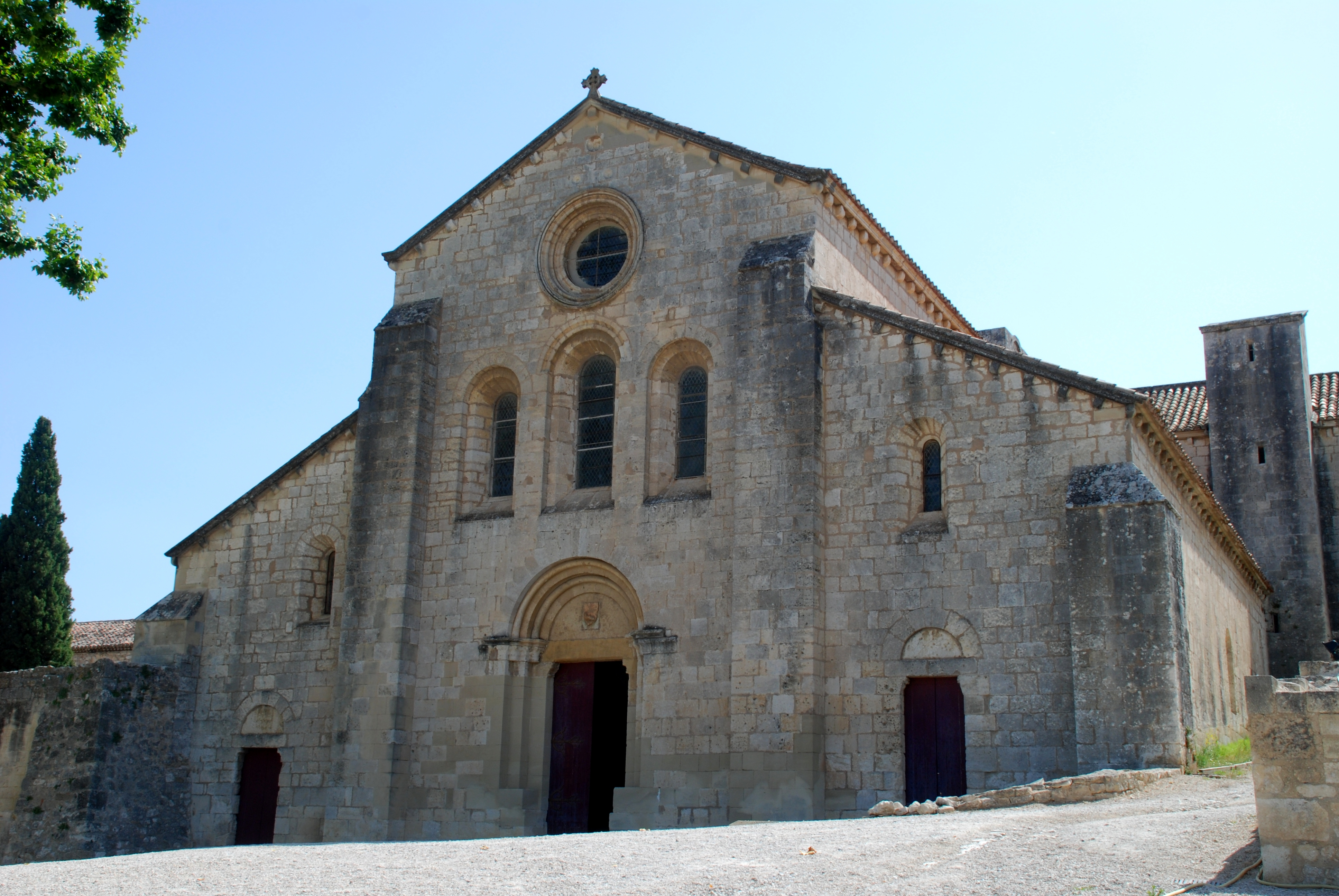 France - Provence - Abbaye de Silvacane